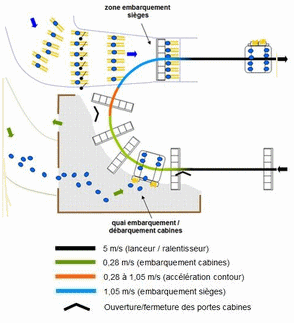 Flux en gare aval d'un téléporté avec sièges et cabines (Télémix ou Télécombi)